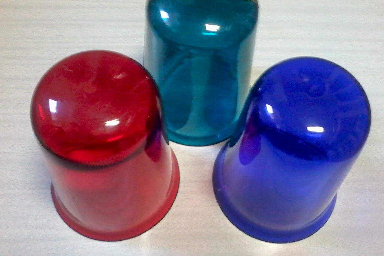 Знято мобілкою Самсунг